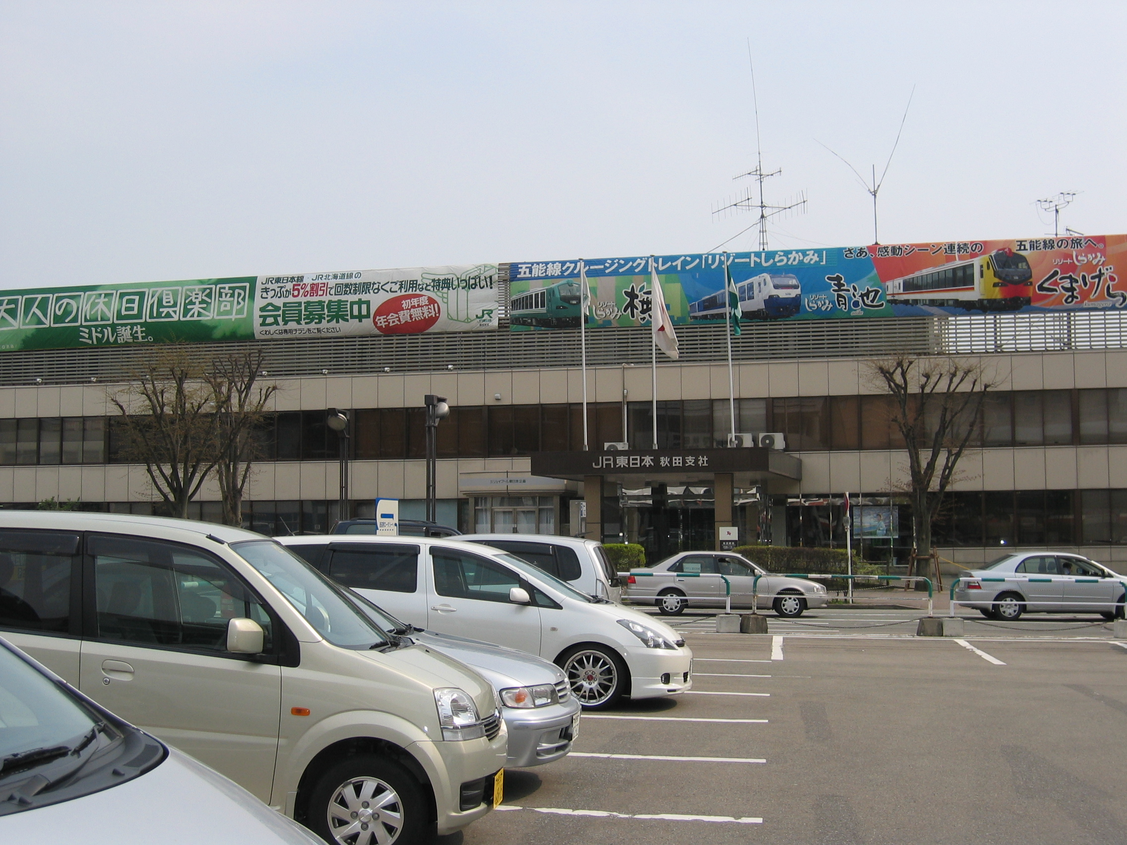 東日本旅客鉄道（JR東日本）秋田支店